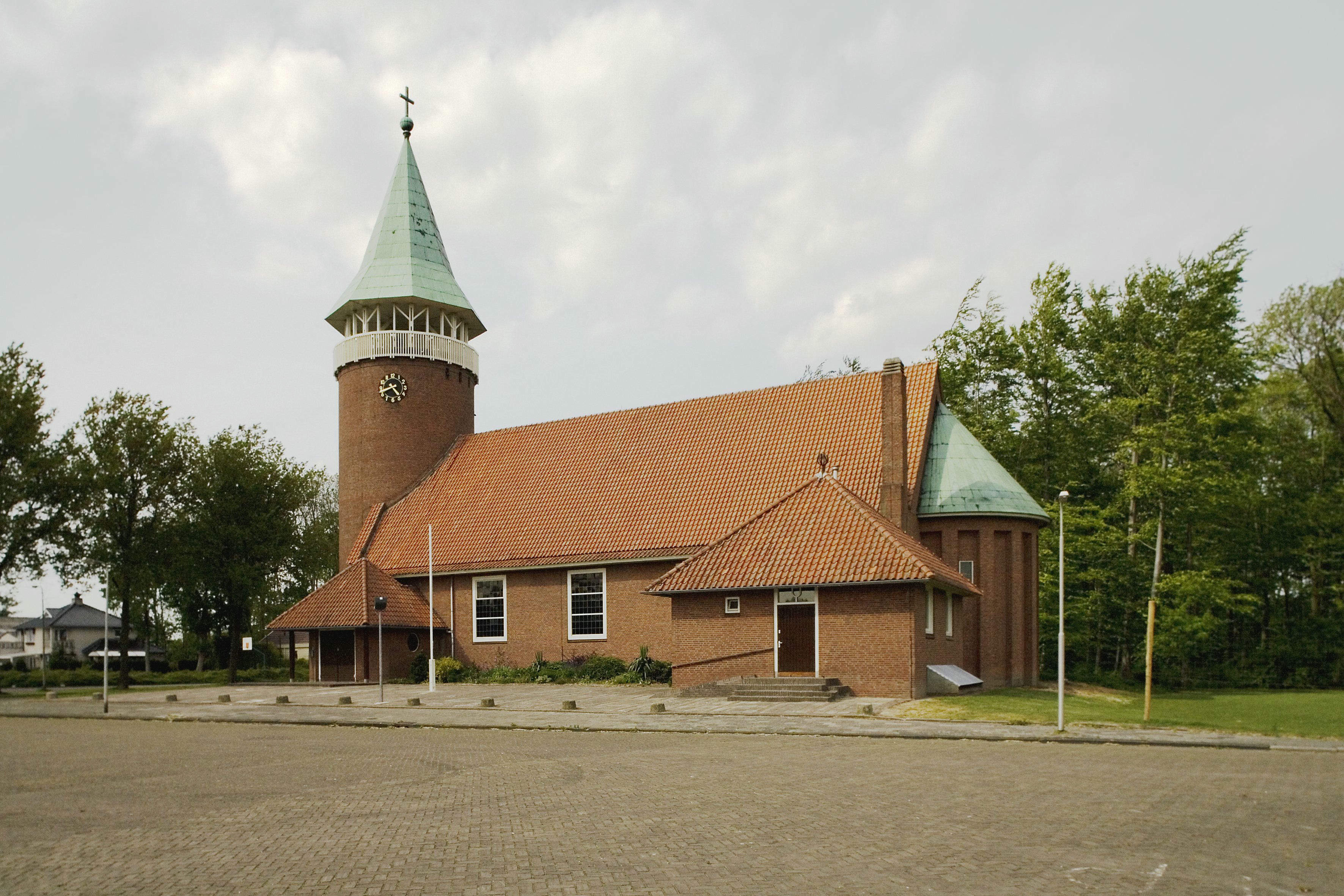 Sint Jozefkerk: Overzicht van de zuidgevel